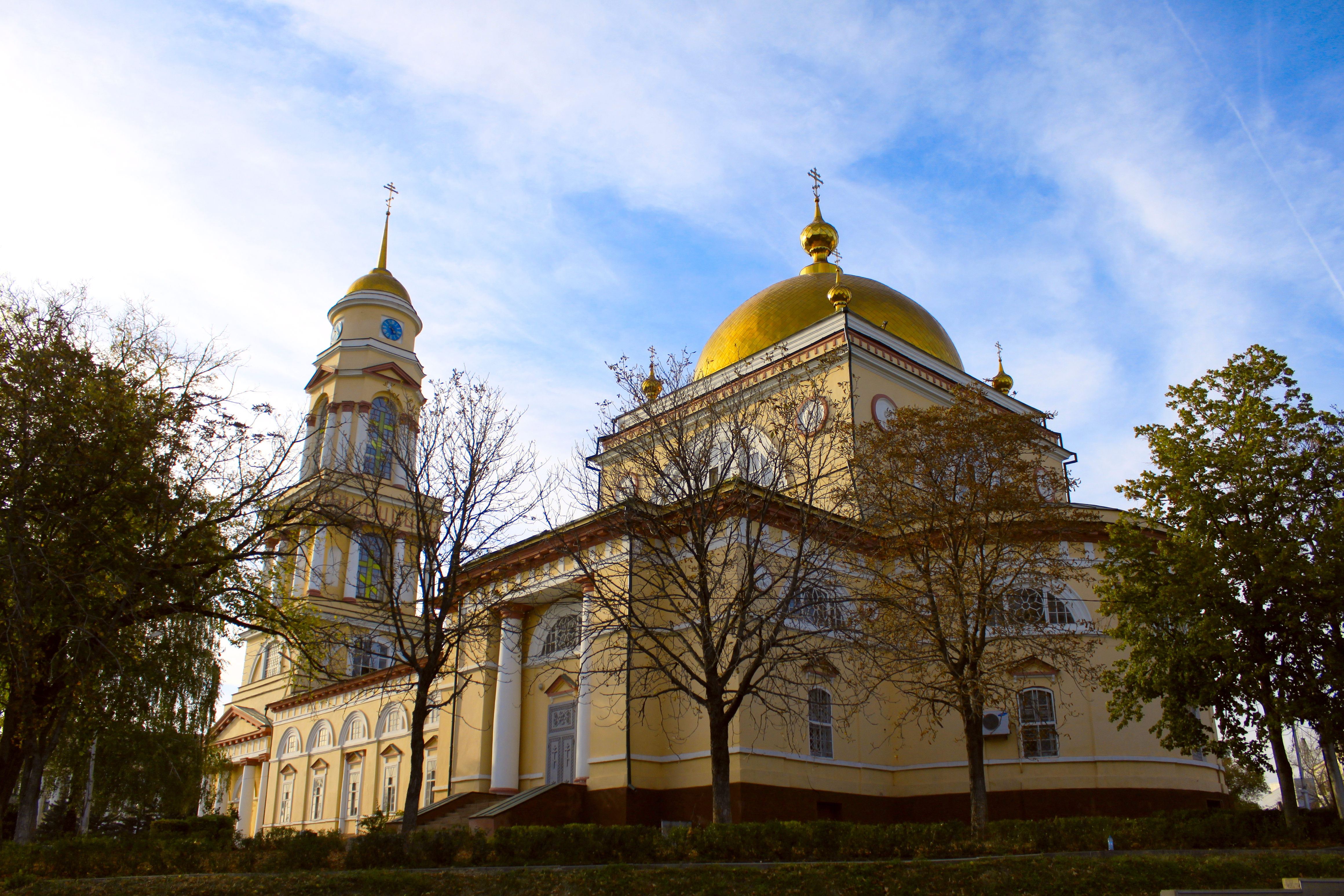 Собор Рождества Христова: площадь Ленина, 4, Липецк, Липецкая область